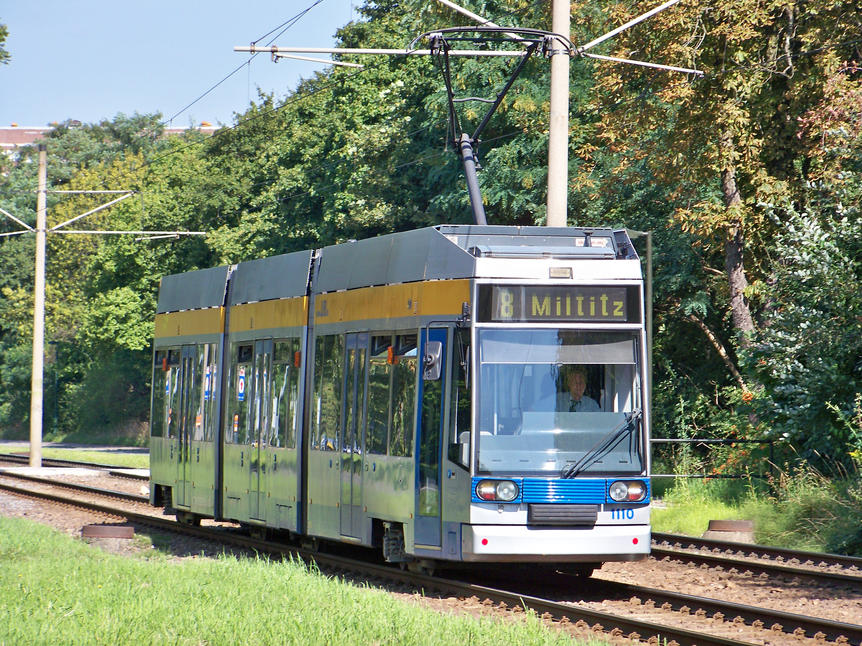 Ein Straßenbahn-Triebwagen vom Typ NGT8 der Leipziger Verkehrsbetriebe auf der Linie 8 (Paunsdorf-Nord–Miltitz) in der Großwohnsiedlung Grünau im Westen von Leipzig zwischen den Haltestellen Schönauer Ring und Am Kirschberg